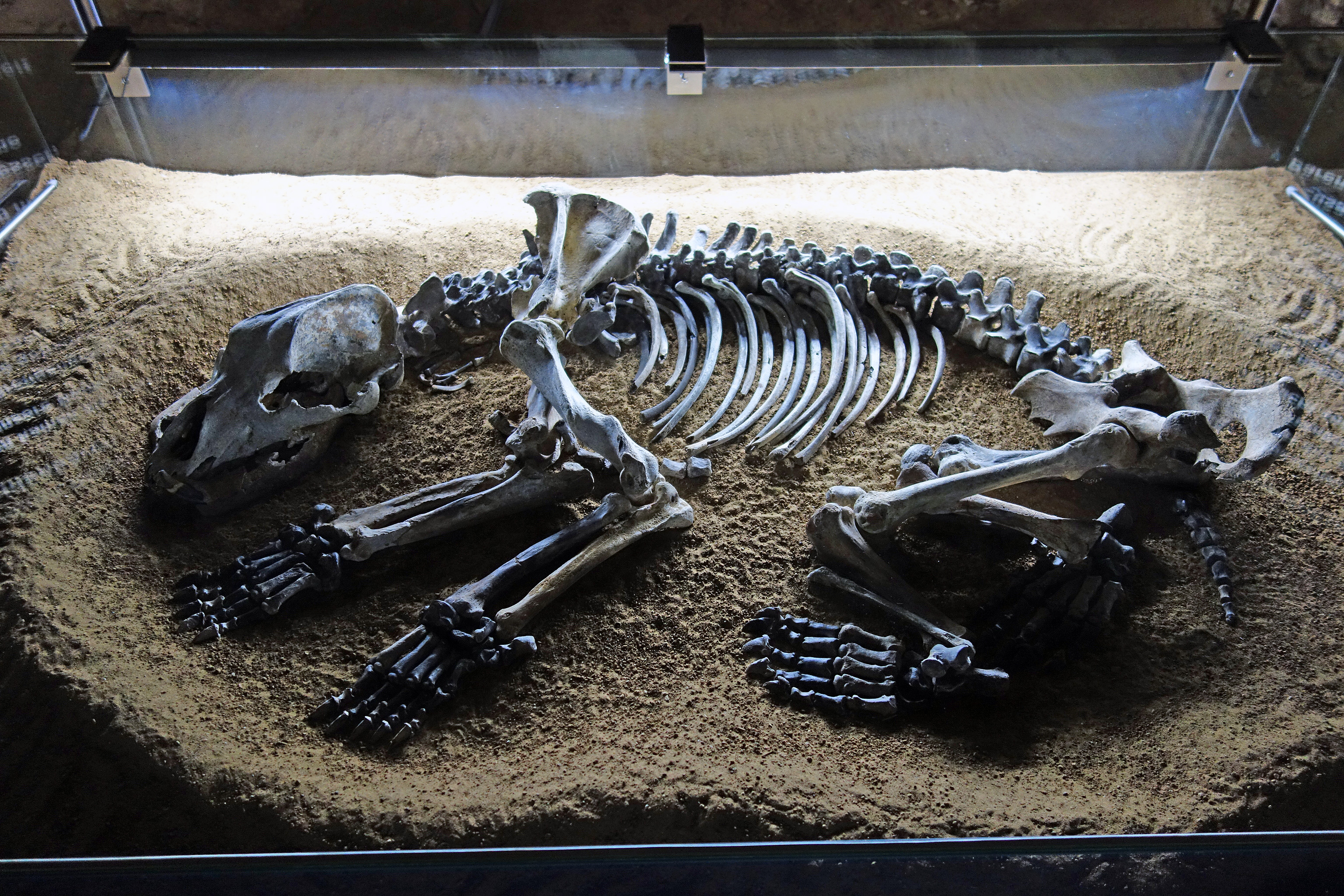 Sophienhöhle, Höhlenbär